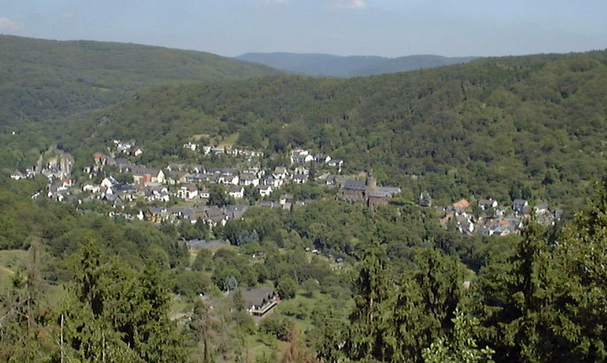 Bildbeschreibung: Ortsansicht Heimbach/Eifel Fotograf/Zeichner: Benutzer:Walter Koch Datum: 18.6.2005